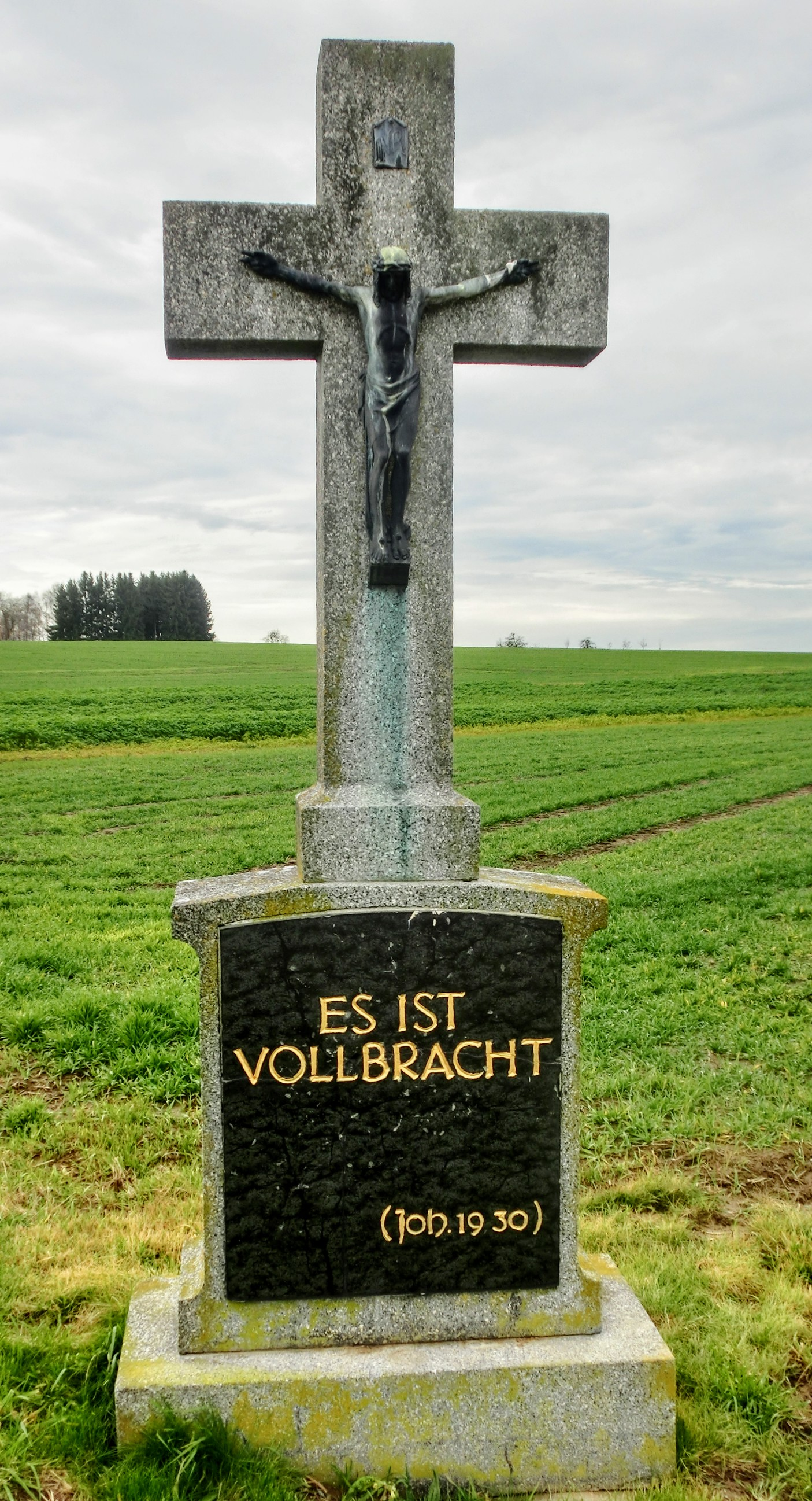 Deutschland (D) - Baden-Württemberg (BW) - Landkreis Konstanz (KN) - Mühlingen, Ortsteil Zoznegg: Flurkreuz an der Mindersdorfer Straße